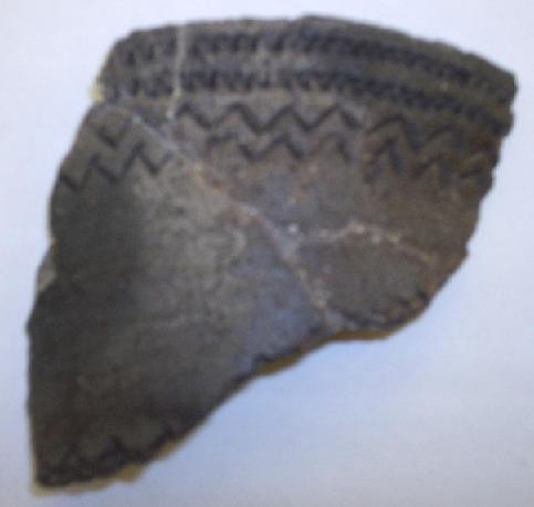 Snörbandskeramik, gravfynd från Mogenstrup på Jylland i Danmark, fotograferad den 18 oktober 2005 av Harri Blomberg.